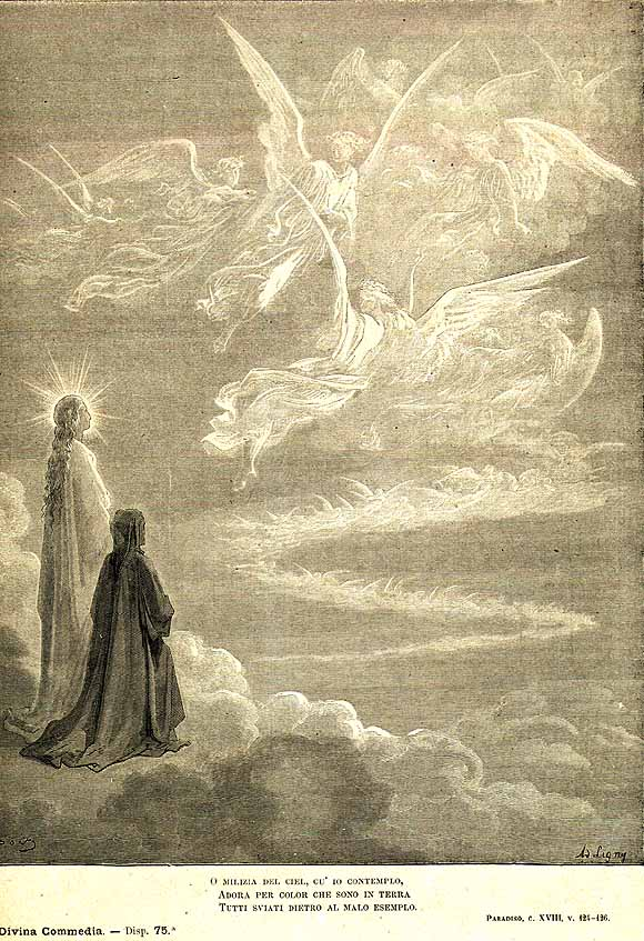 Paradiso by Dante Alighieri Illustration